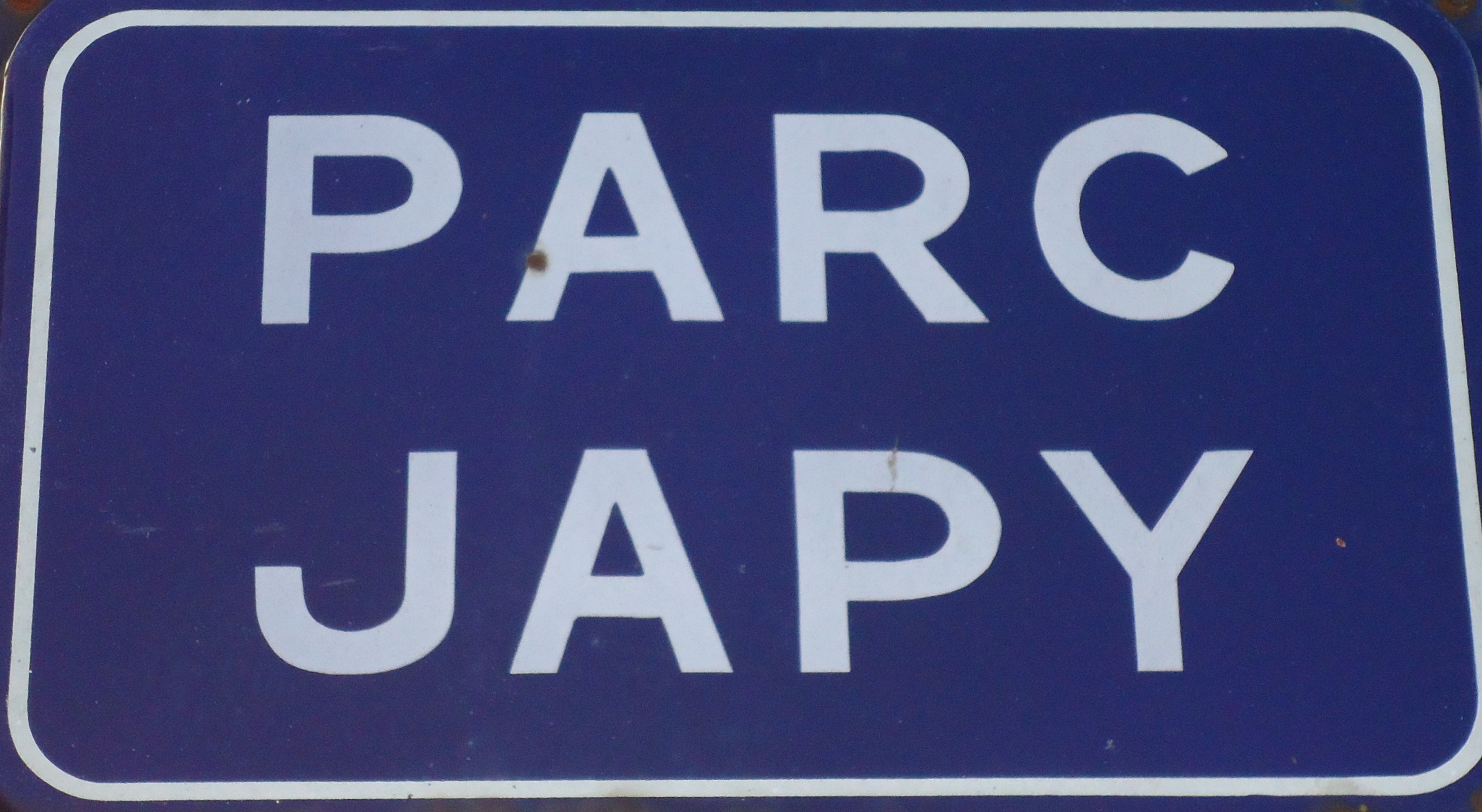 Parc Japy